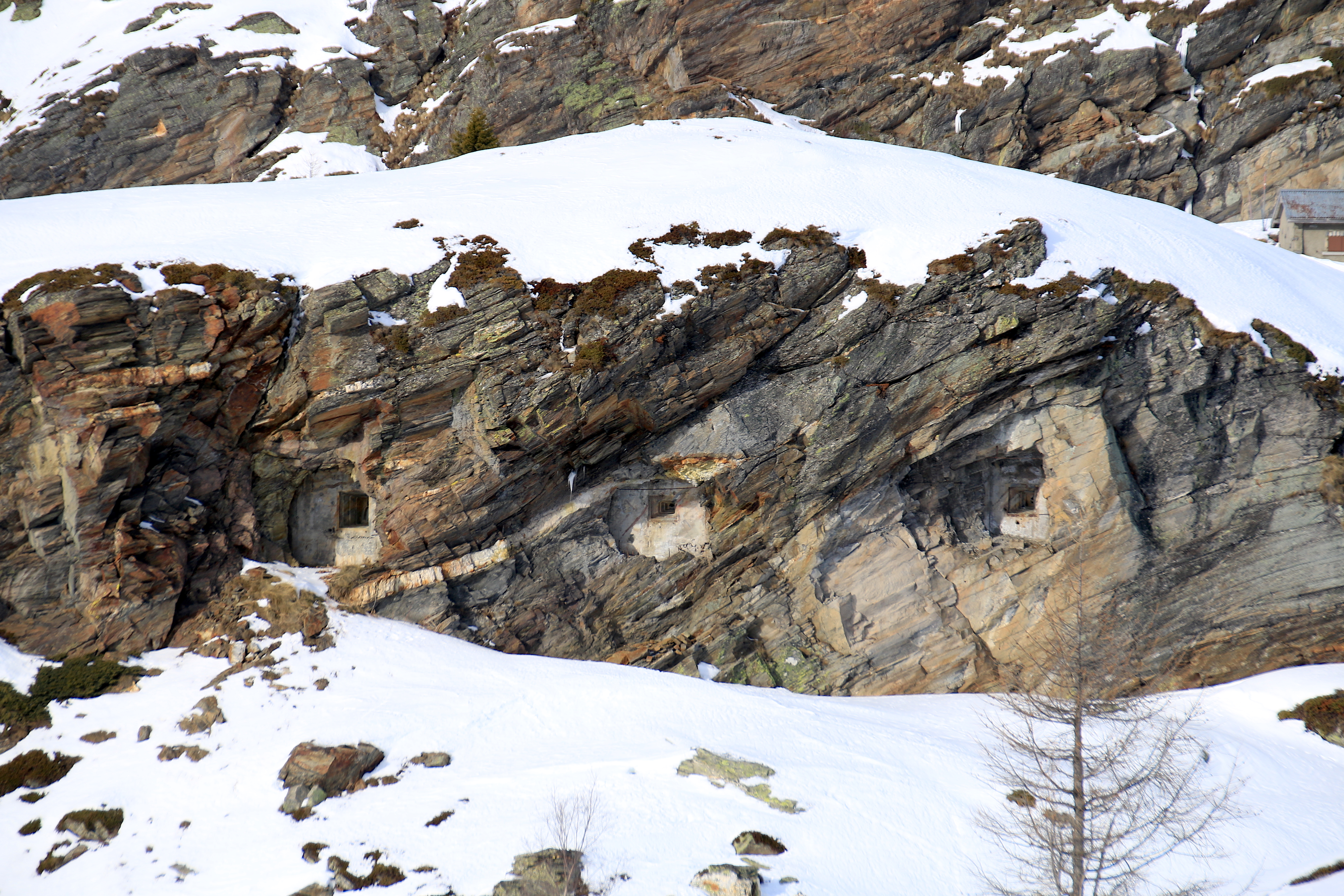 Maschinengewehrstellungen Simplonpass (2019): Infanteriewerk Blatten (Blatte, Simplonpass West), Schweizer Landeskoordinaten: 644738 / 121750